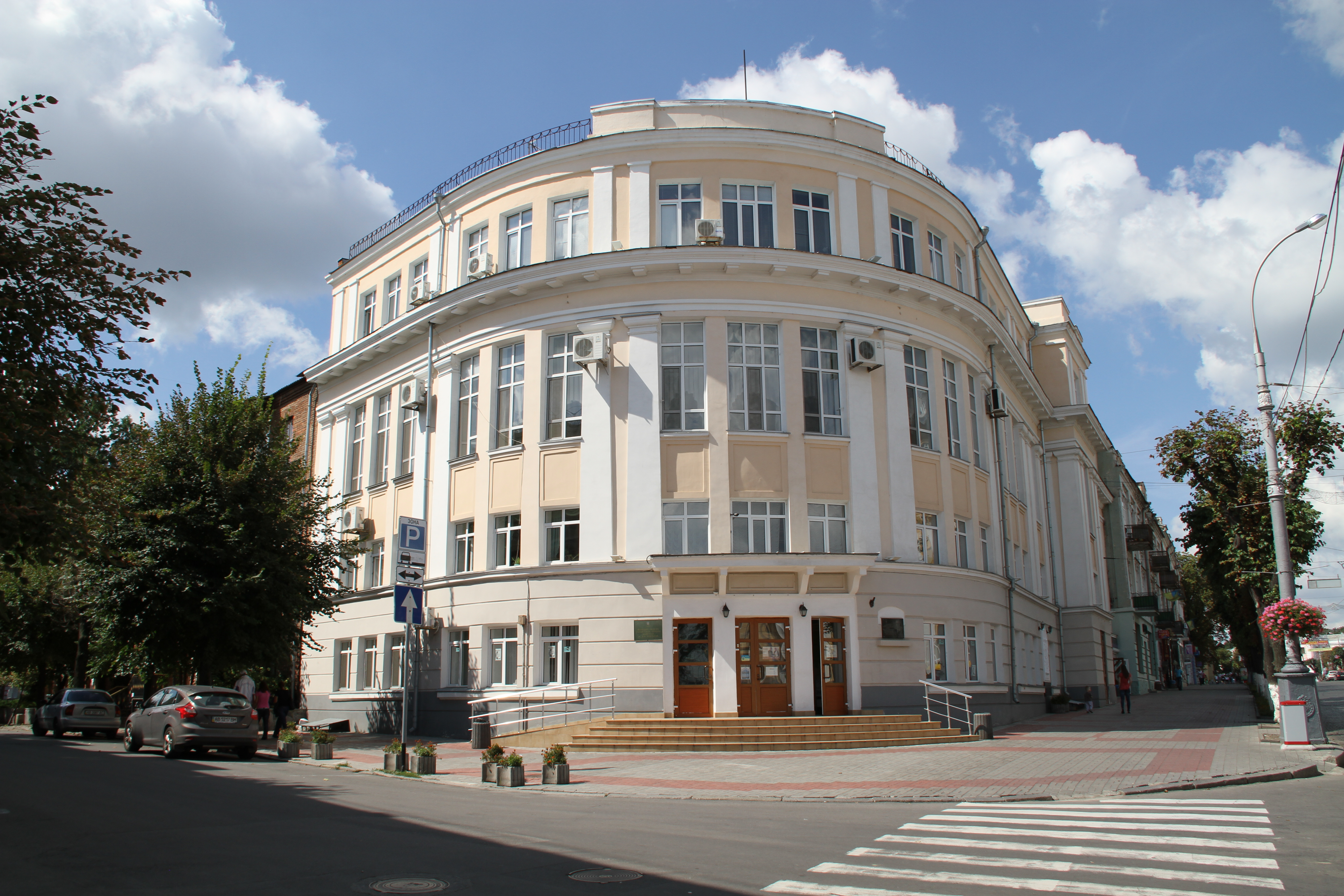 Библиотека им. К. А. Тимирязева (Винница)